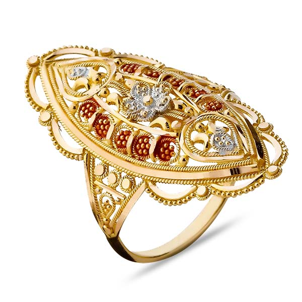 Anel exclusivo da Linha Alshahba